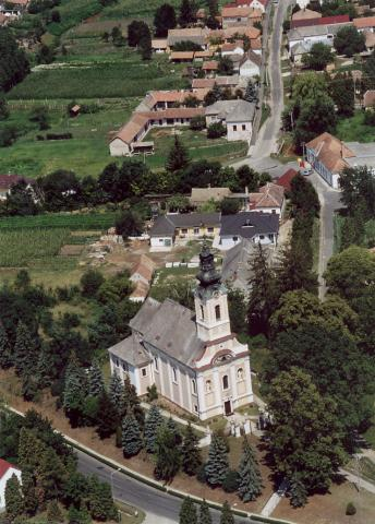 Preĝejo de Berzence.